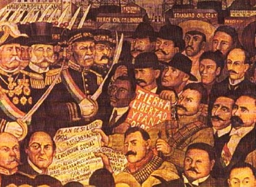 quadro Tierra y Libertad de Idelfonso Carrara (?) monstrando os magonistas liderados por Ricardo Flores Magón fazendo frente ao governo de Porfirio Díaz.